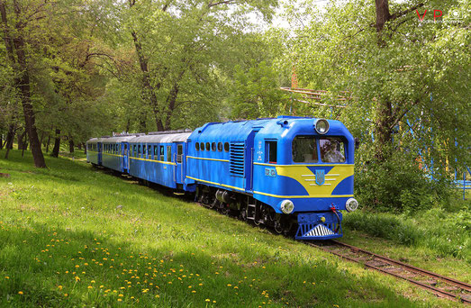 ТУ2-134 зі старими вагонами на дитячій залізниці